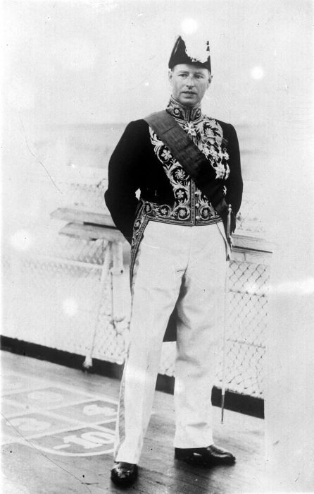 Repronegatief. Gouverneur-Generaal Tjarda van Starkenborgh Stachouwer